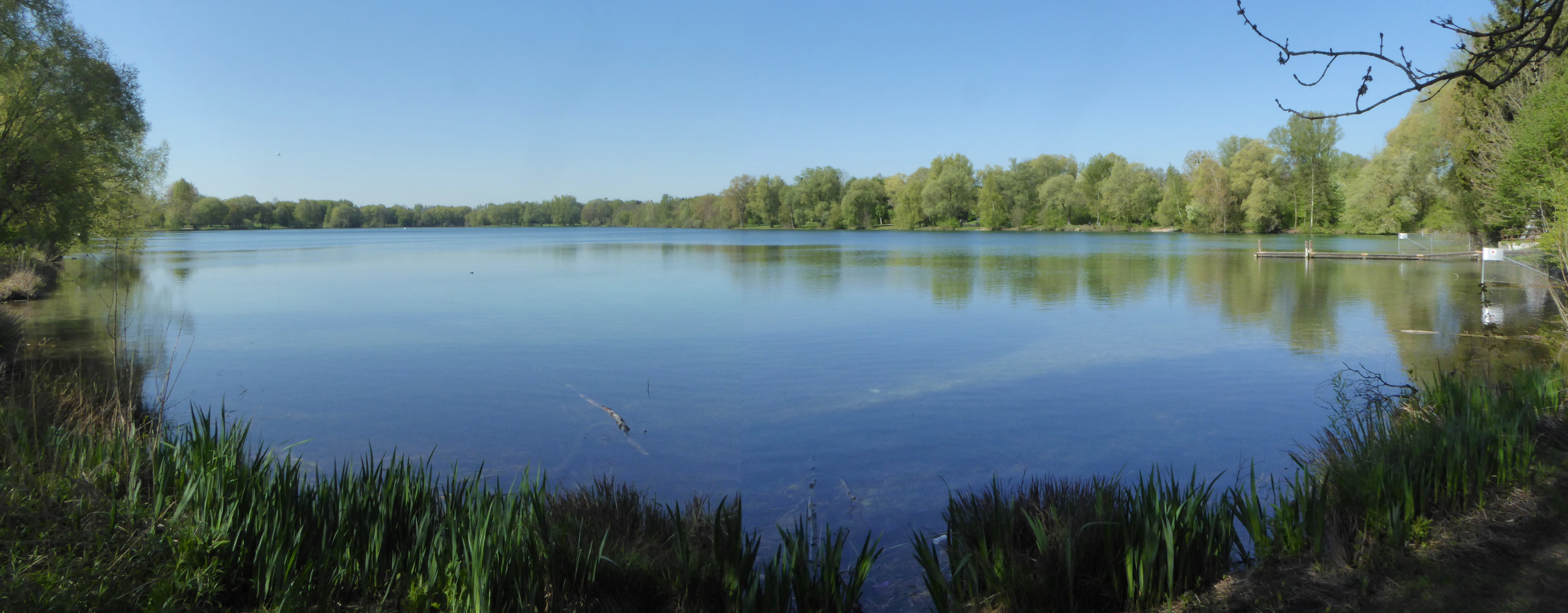 Boarisch: München/Mingga, da Fejdmochinga Sä vo da nord-estlichn Eckn aus xeng.